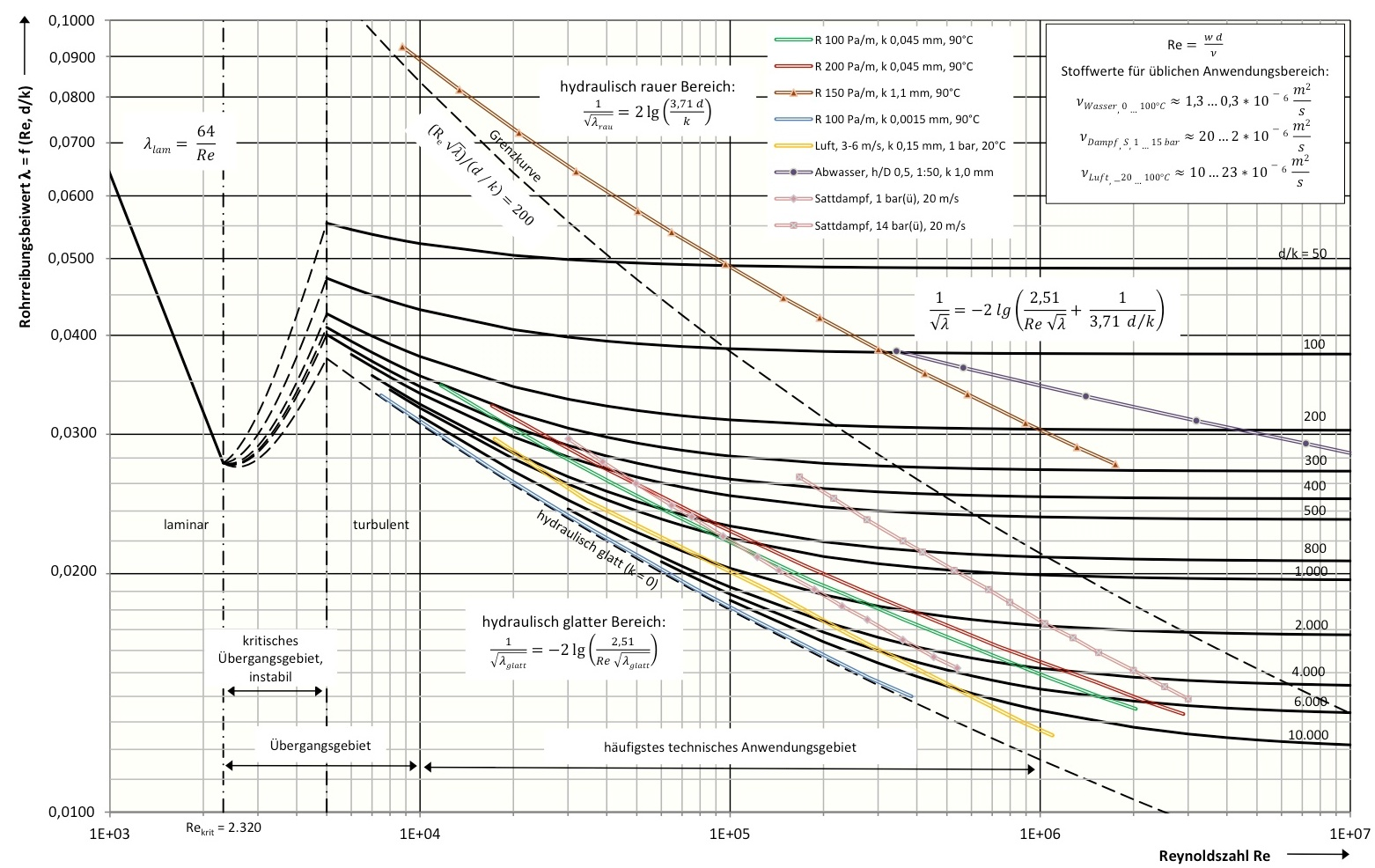 Rohrreibungsbeiwert Lambda, Reynoldszahl-Diagramm für gerade Rohrleitungen nach Prandtl-Colebrook